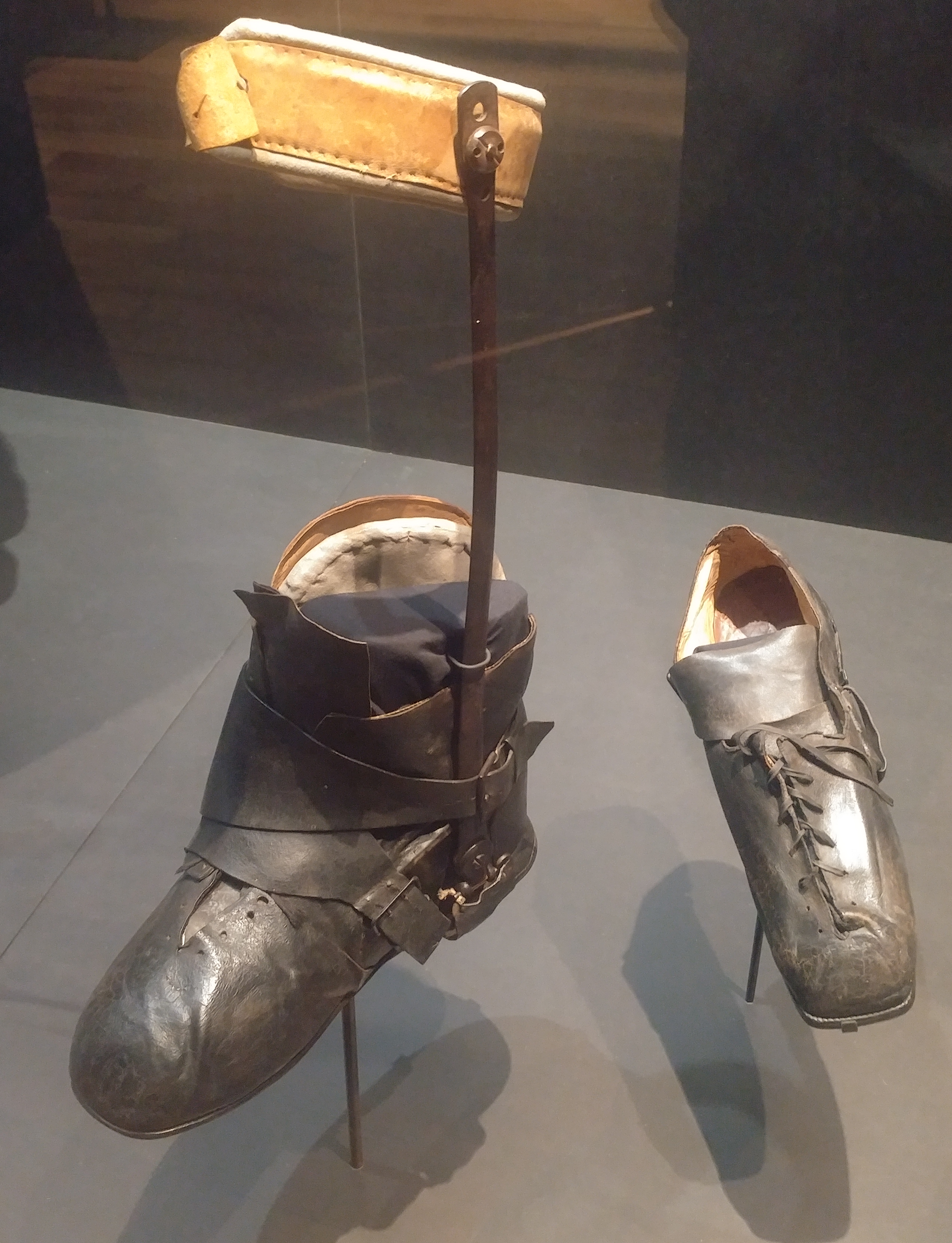 Chaussure orthopédique de Charles-Maurice de Talleyrand-Périgord, château de Valençay